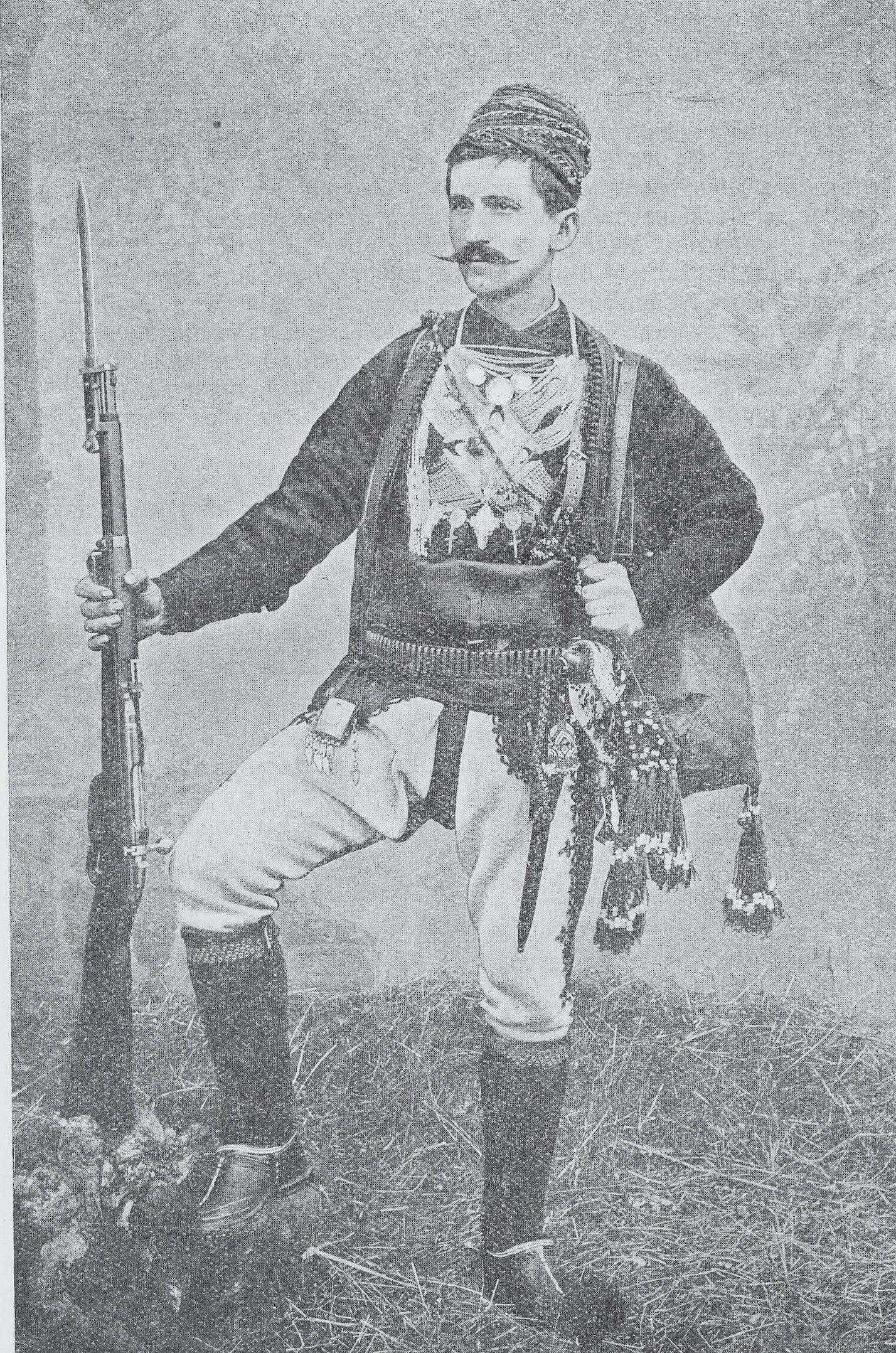 Войводата Апостол Петков Терзиев Ениджевардарското слънце. Автор: Алберт Сониксен (1878-1931)